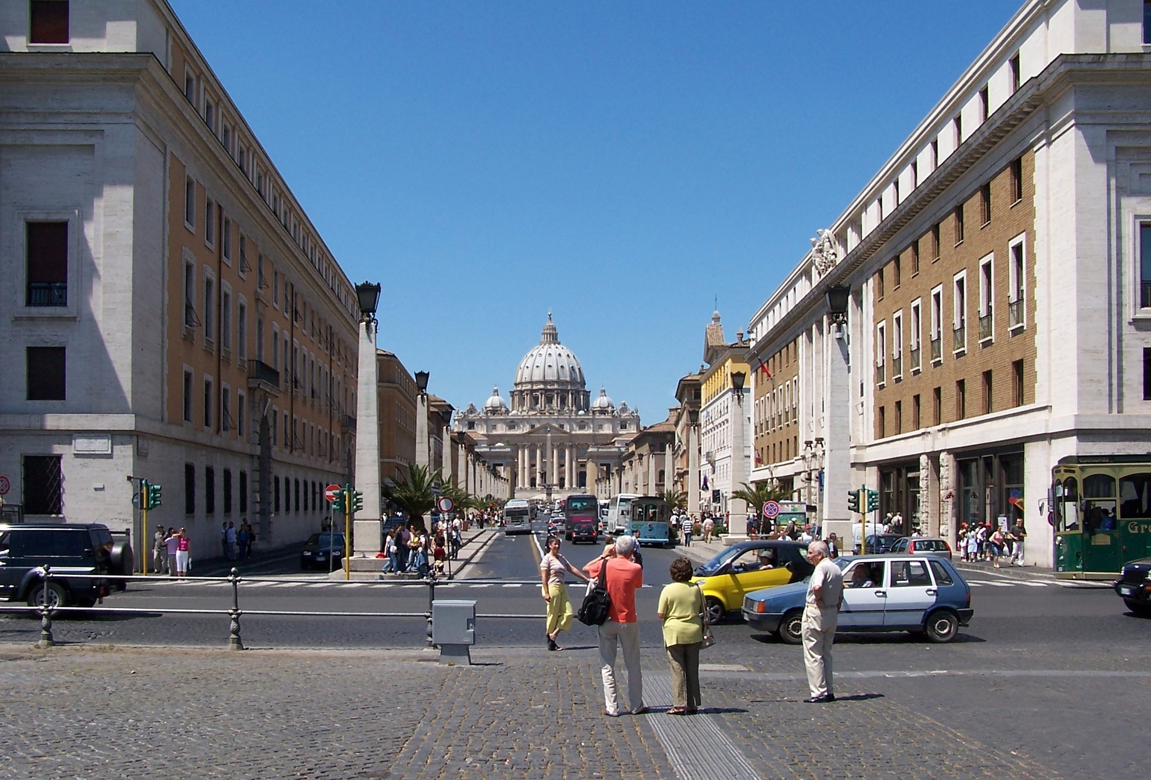 Via della Conciliazione, Rome, Italy. Right building: Palazzo Pio